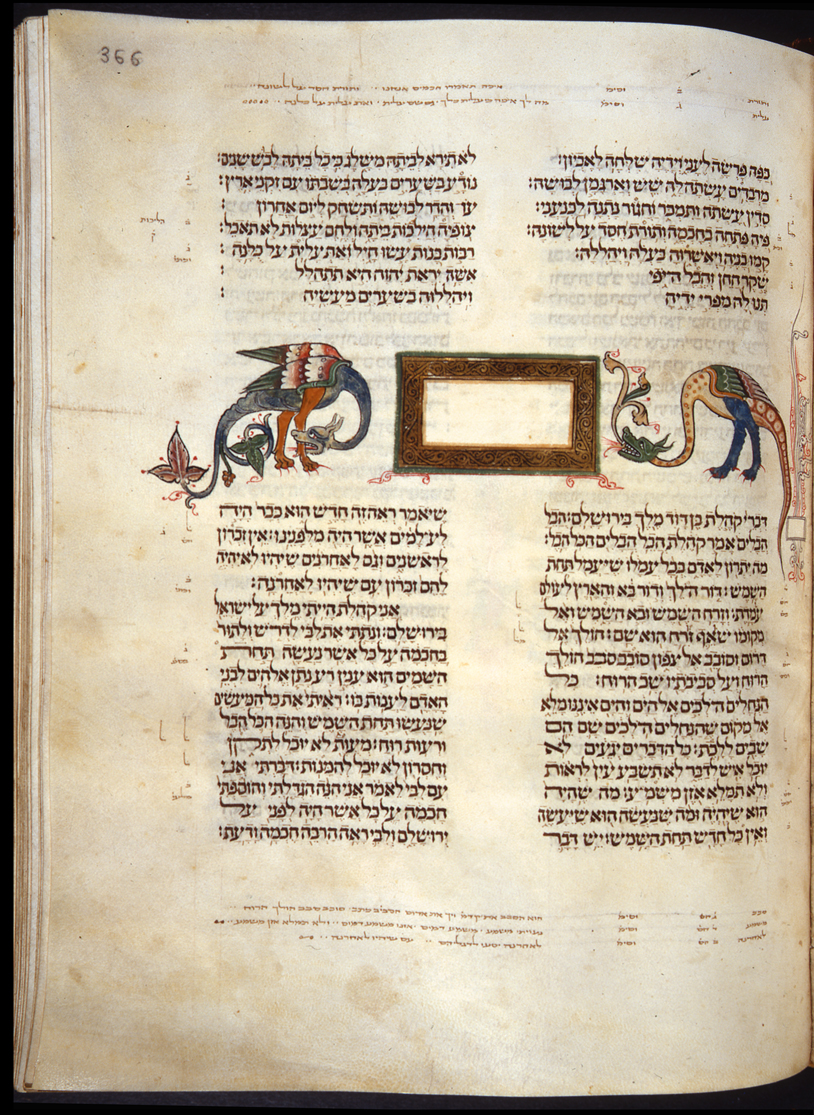 Bíblia de Cervera, Eclesiastes (fl 366)